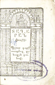 Сборник стихов армянского поэта Багдасара Дпира